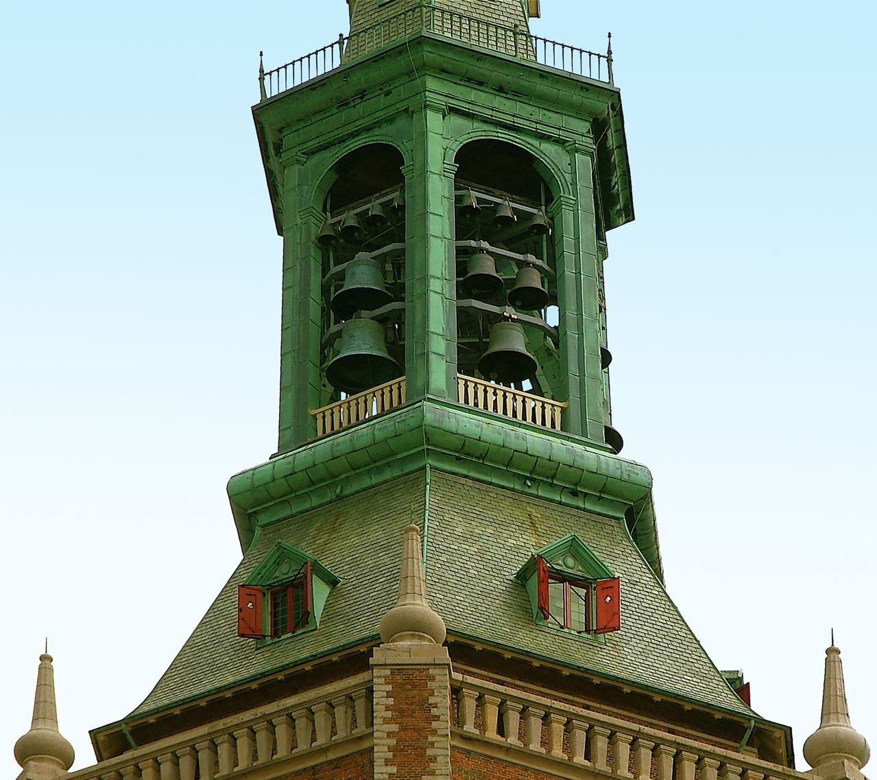 Den Haag -Van de week hoorde ik de internationale spelen op het carillon dat vond ik wel heel apart Ontwaakt! verworpenen der Aarde Ontwaakt! verdoemd in hong'ren sfeer Reed'lijk willen stroomt over de Aarde en die stroom rijst al meer en meer Sterft, gij oude vormen en gedachten Slaaf geboor'nen, ontwaakt! ontwaakt! De wereld steunt op nieuwe krachten begeerte heeft ons aangeraakt